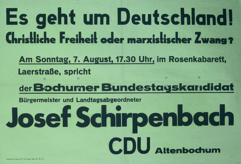 Ankündigungsplakat einer Veranstaltung mit osef Schirpenbach, Christlich Demokratische Union Deutschlands